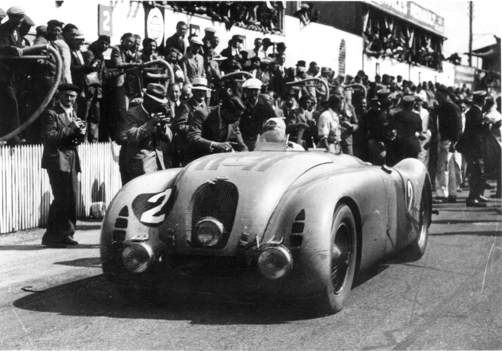 Bugatti TypeG Tank Le Mans 1937